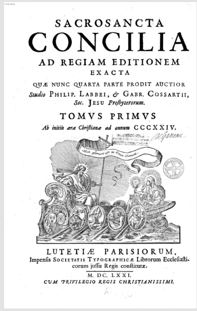 собрание документов поместных и Вселенских соборов на древнегреческом и латинских языках в 17 книгах: «Sacrosancta concilia ad Regiam editionem exacta», Philippe Labbe